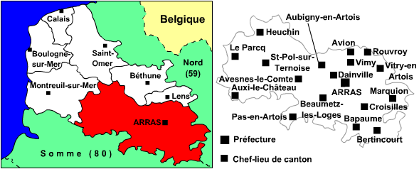 Carte de l'arrondissement d'Arras (62) avec chefs-lieux de cantons Utilisateur:Manchot sanguinaire